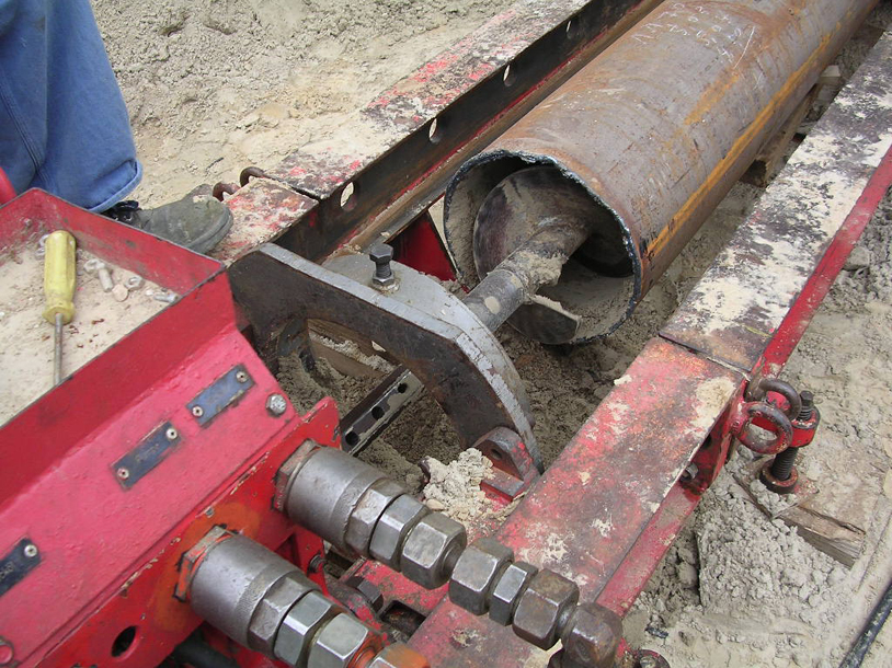 Vorrichtung zum Bohrpressen_01